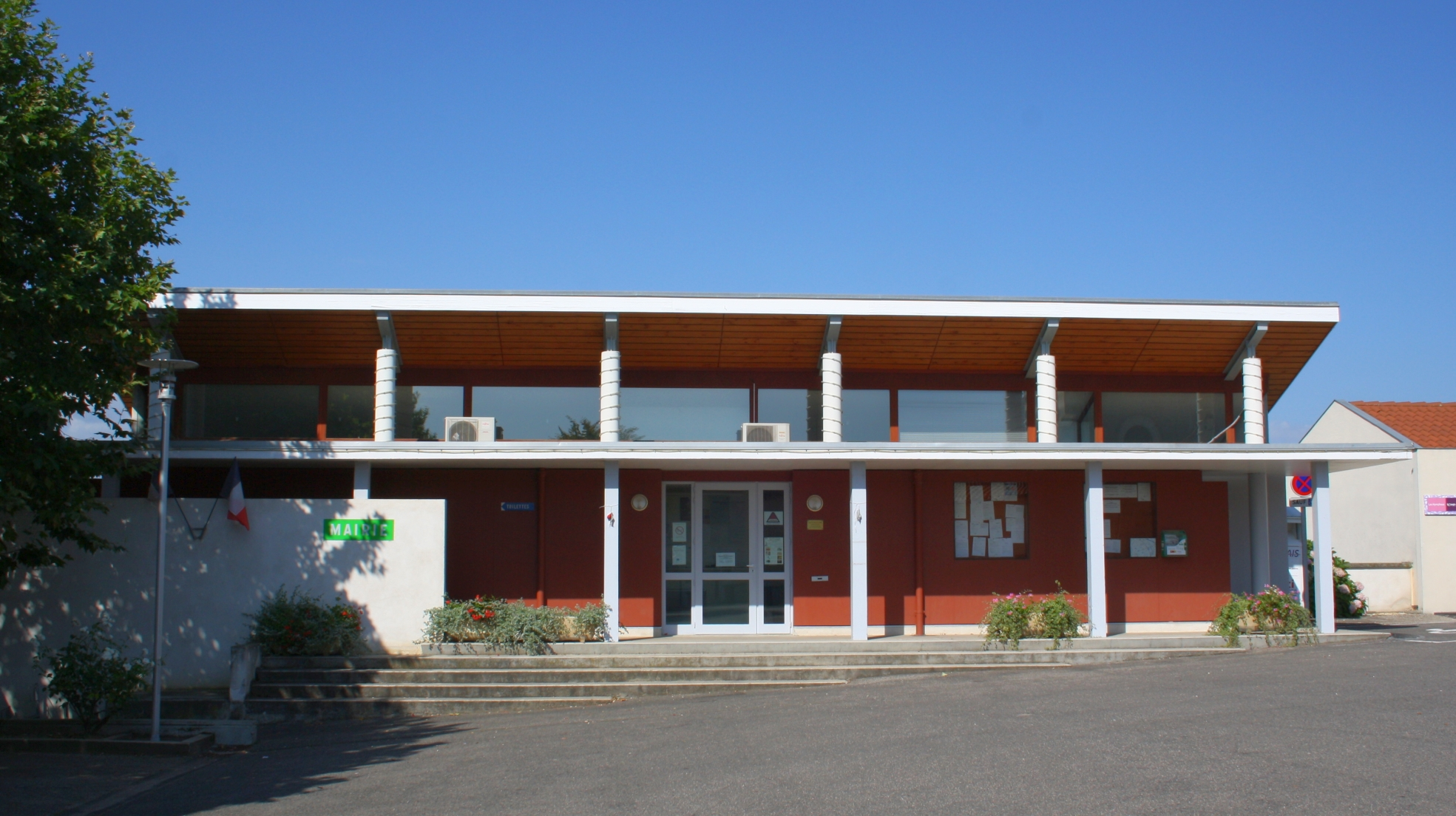 Mairie de Chalain-le-Comtal (Loire)